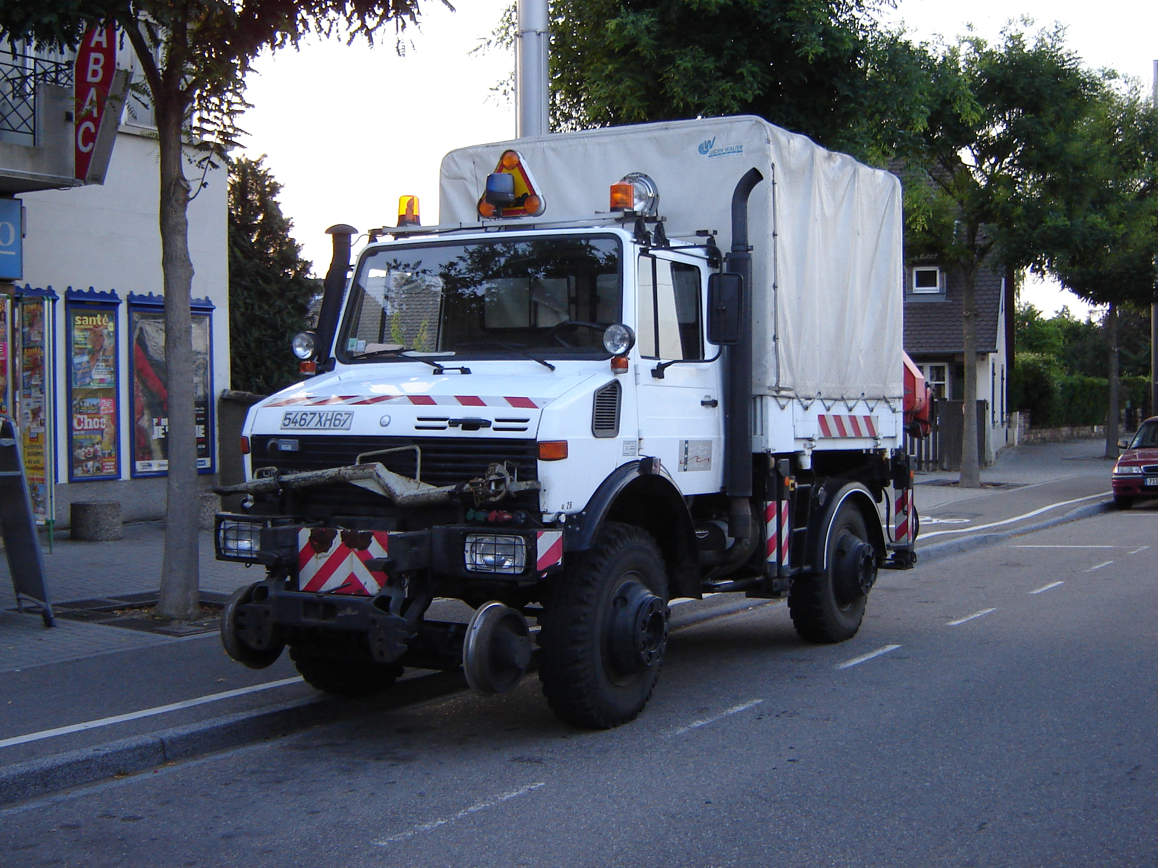 Unimog U1650L rail-route de la CTS, à Strasbourg